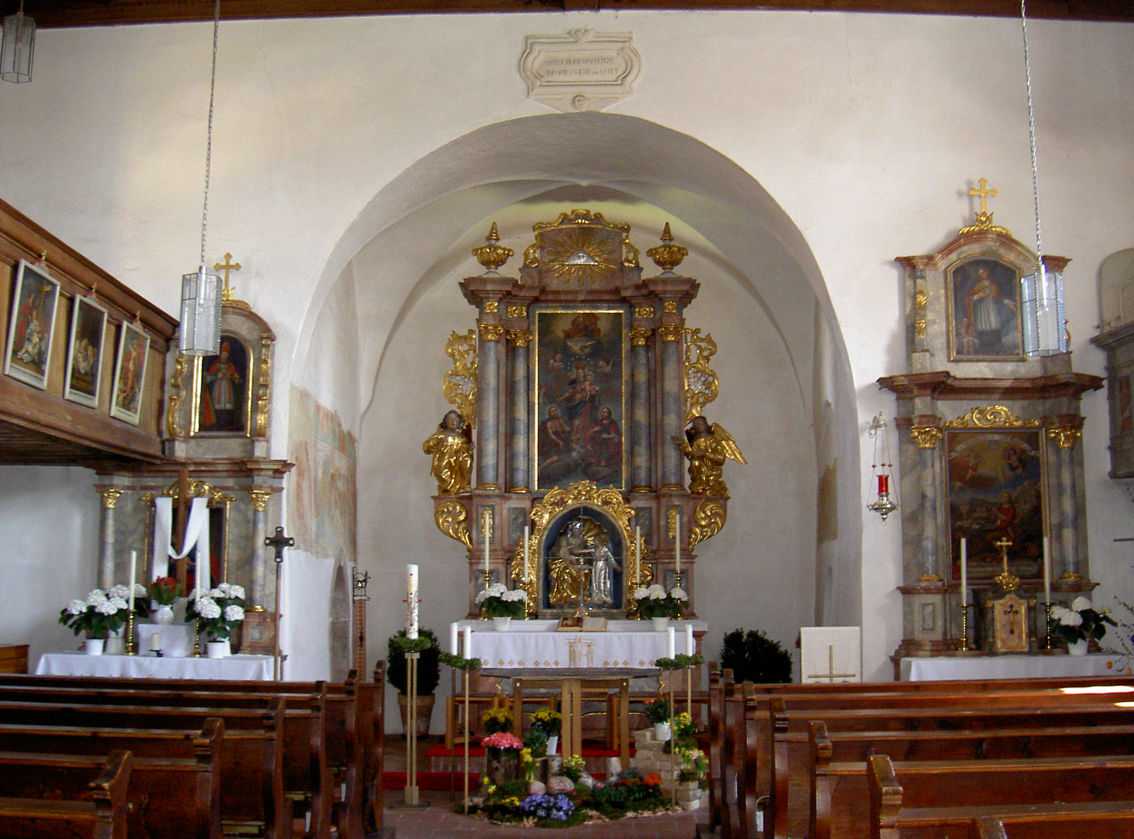 Altenstadt, Simultankirche St. Johannes Baptist